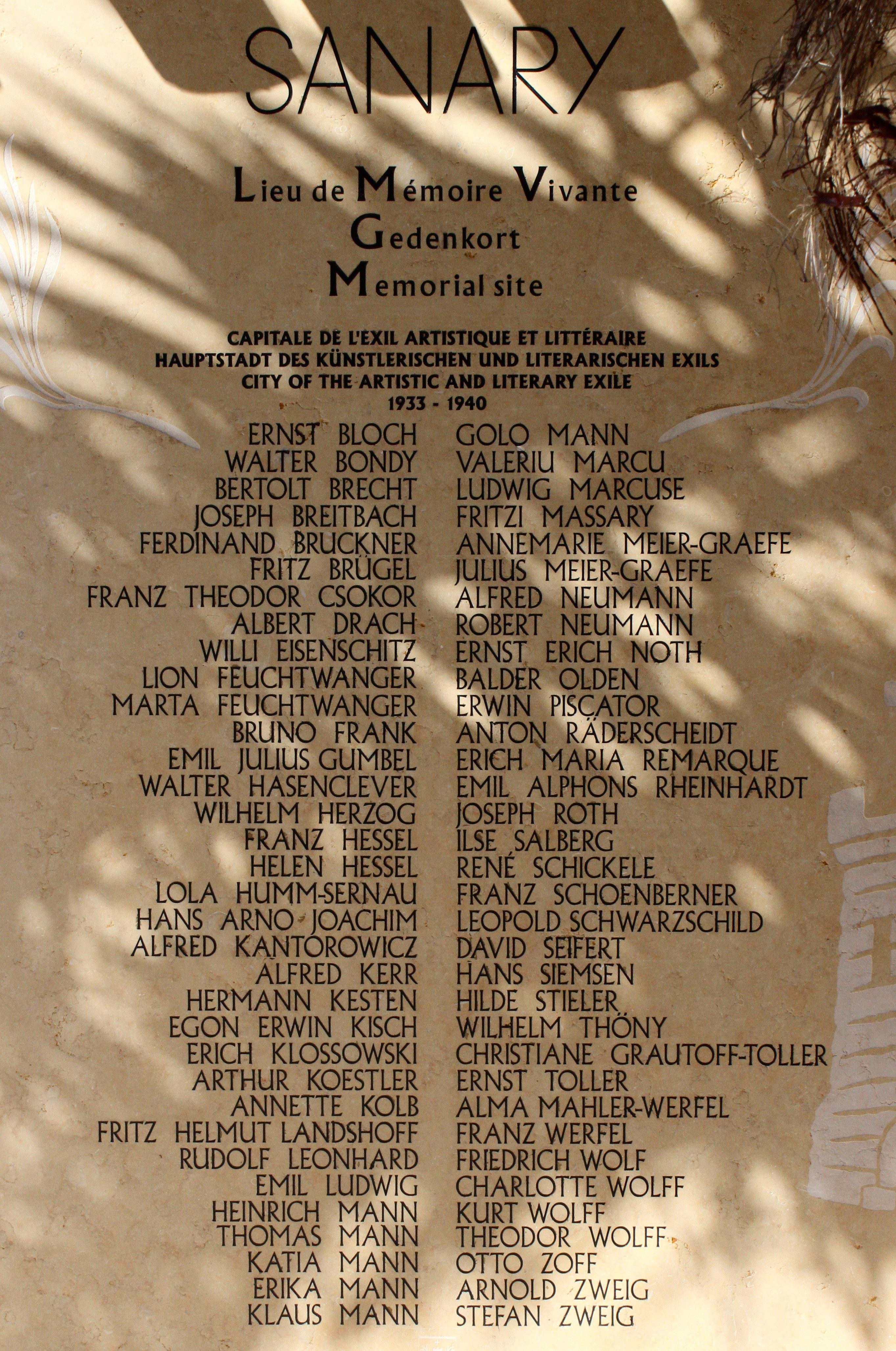 Plaque commémorative apposée sur le mur de l'Office de Tourisme rappelant les artistes et écrivains étrangers, dont la plupart étaient des exilés allemands, ayant séjourné à Sanary-sur-Mer (département du var) au cours des années 1930.